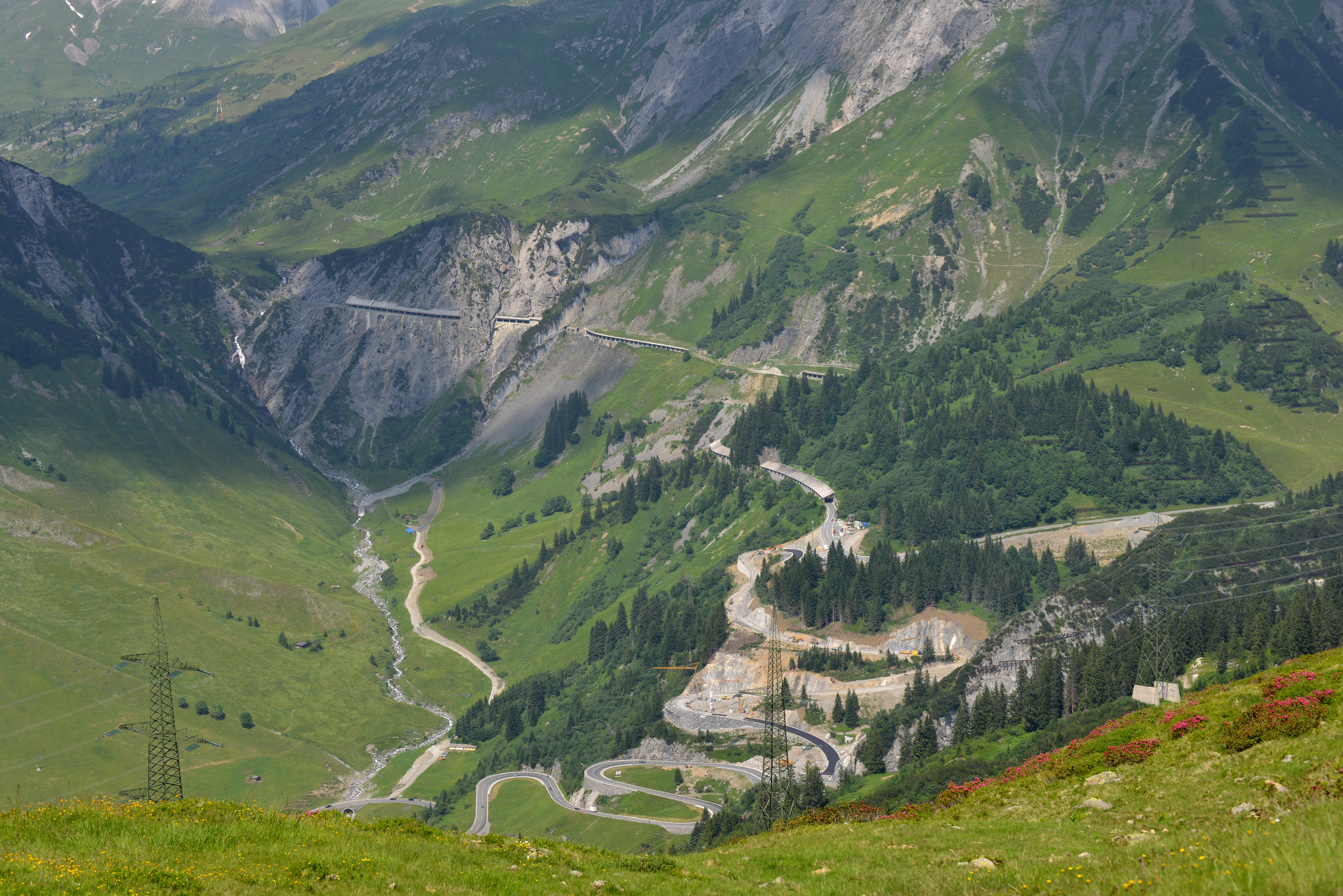 Blick von der Stubinger Alpe auf die Neutrassierung der Arlbergstraße mit Anbindung zum Flexenpass.